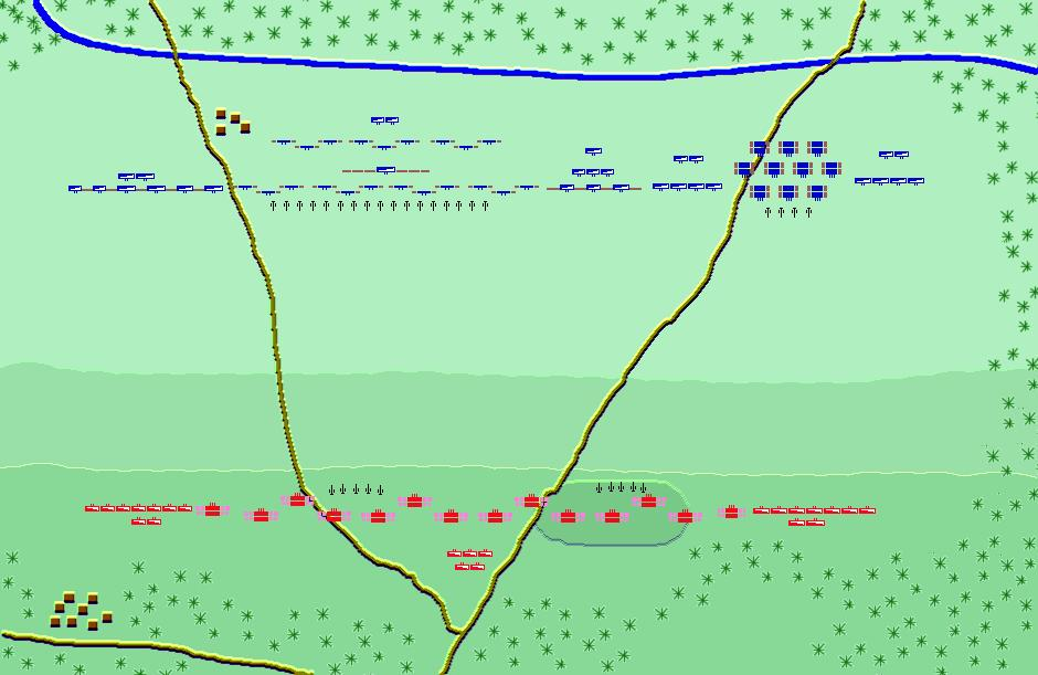 Description